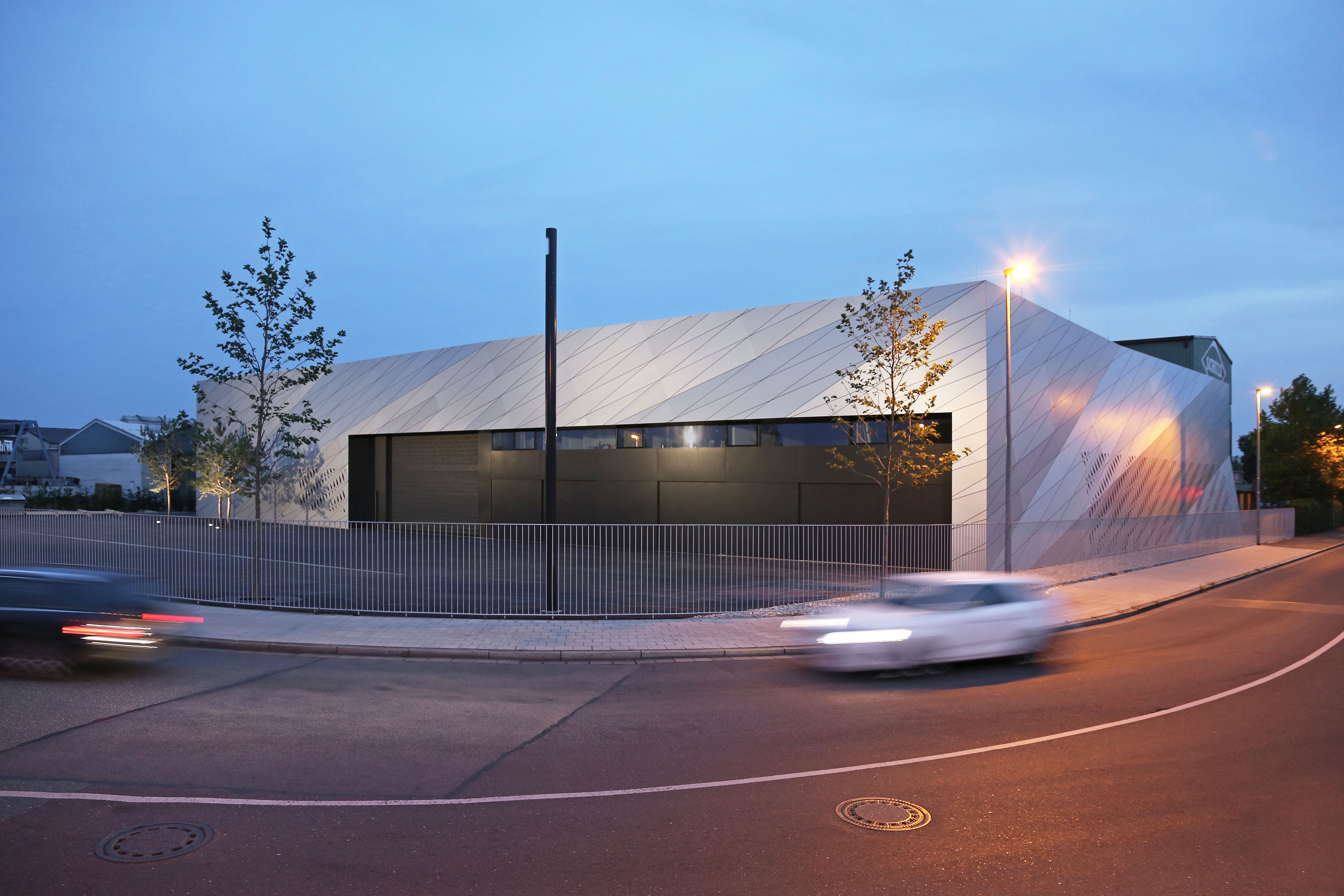 Ende 2014 in Betrieb genommene Produktionshalle von Kaspar Schulz, Bamberg mit einer Fläche von 2.000m²